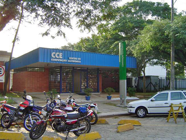 Centro de Computação Eletrônica da Universidade de São Paulo, Brazil.